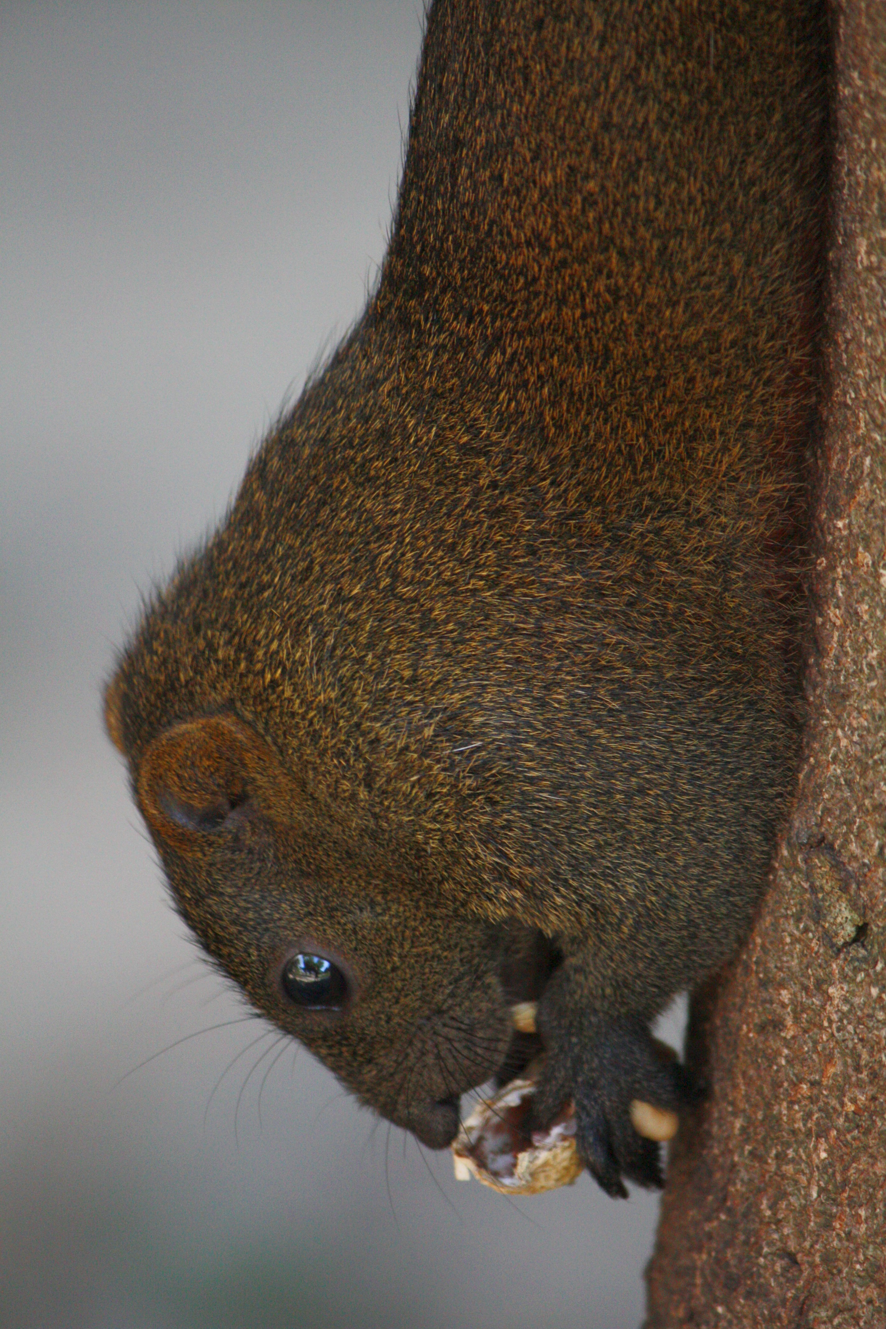 Ein Pallas-Hörnchen im Park von Taipeh, Taiwan